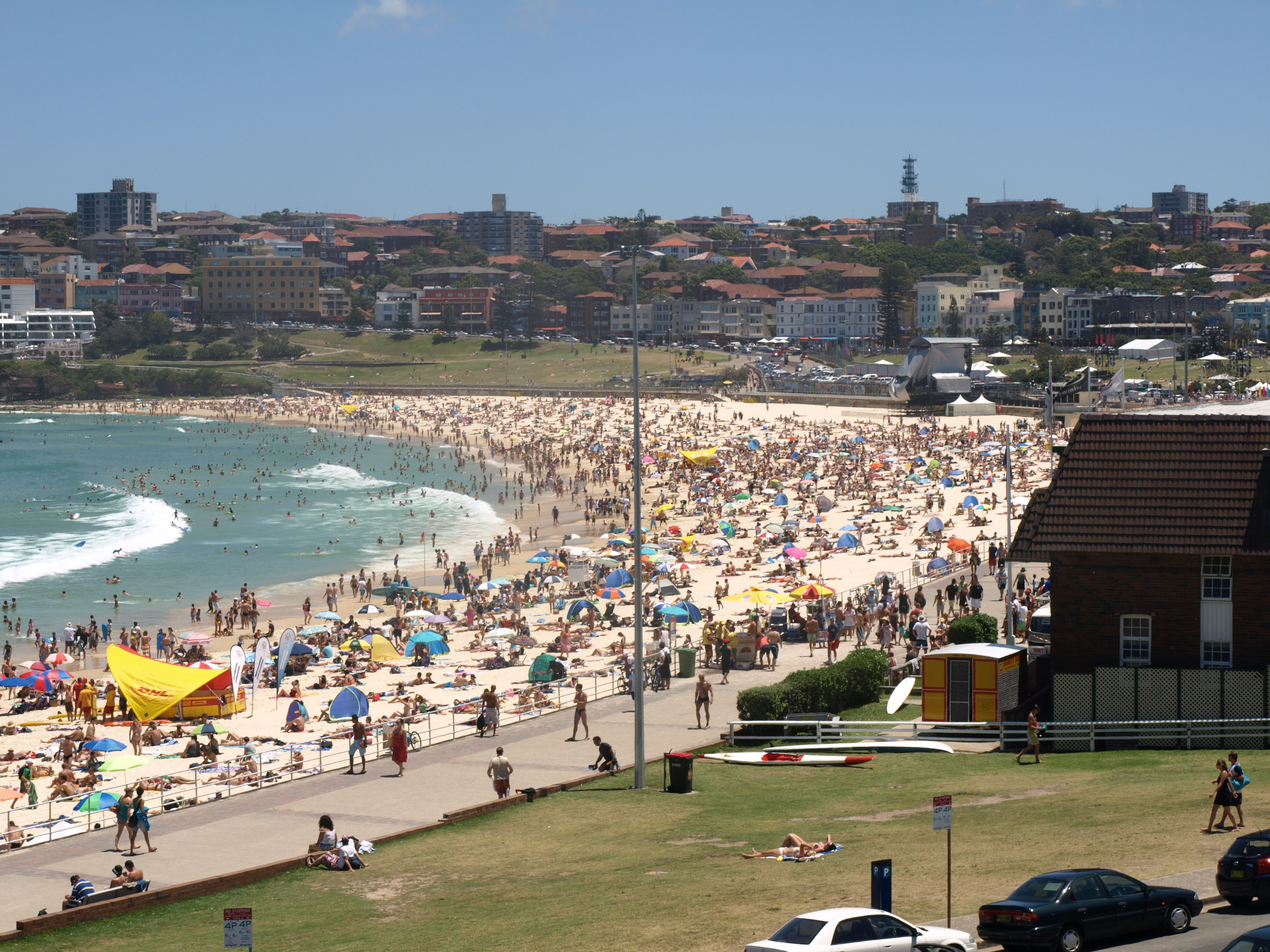 Bondi Beach